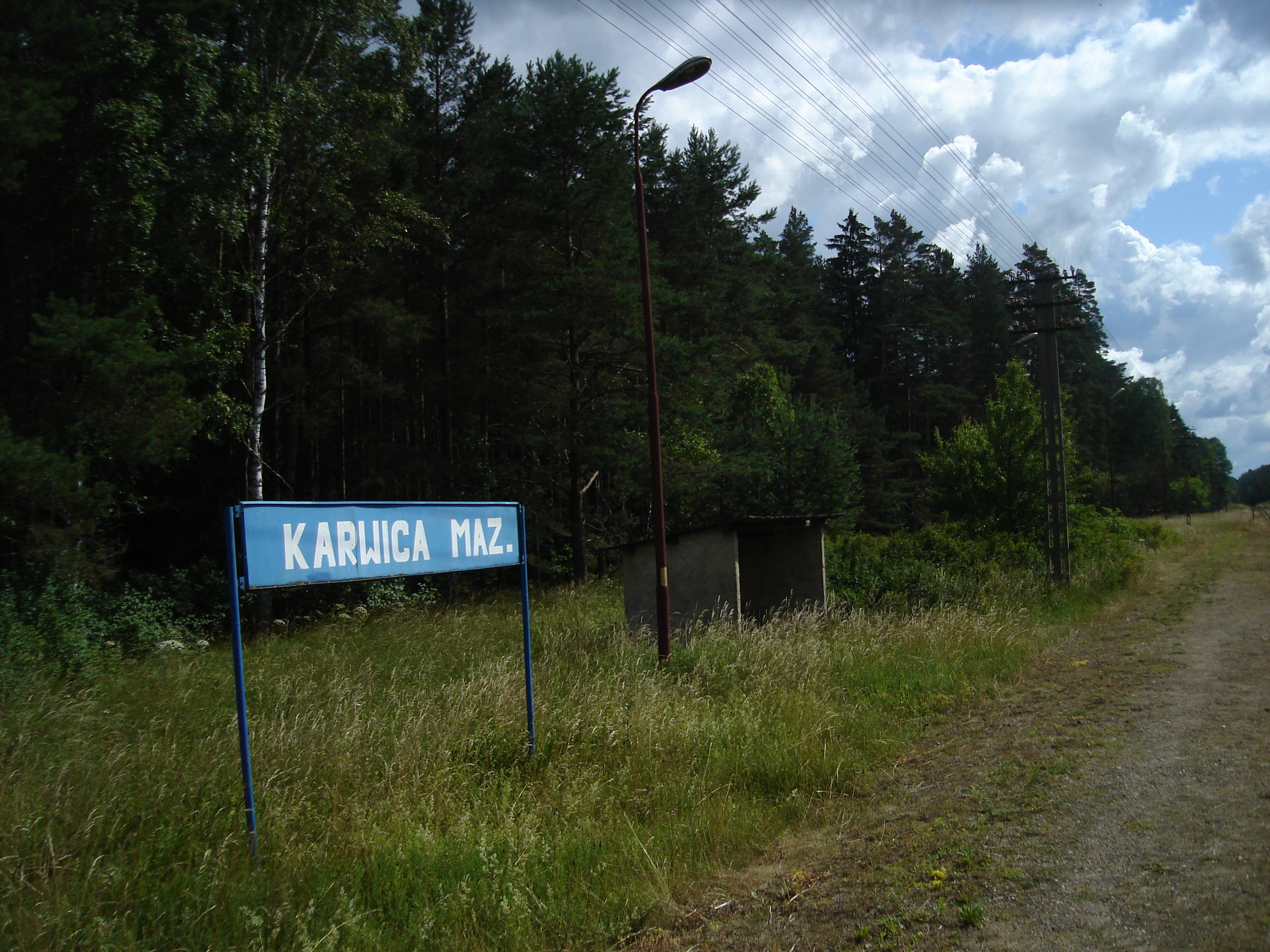 Przystanek kolejowy Karwica Mazurska